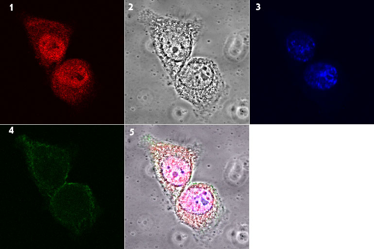 תמונות של אותו תא שצולמו באורכי גל שונים על ידי מיקרוסקופ קונפוקלי. 1: צביעה לחלבון ErbB-4 המצוי ברובו בגרעין התא, מסומן Texas red (אדום). 2: תצלום אור. 3: צביעת הכט- צביעת גרעינים (כחול) 4: צביעה לחלבון EGFR המצוי ברובו בממבראנת התא, מסומן FITC (ירוק). 5: איחוד התמונות. רישיון נוצר על ידי משתמש:Itayba